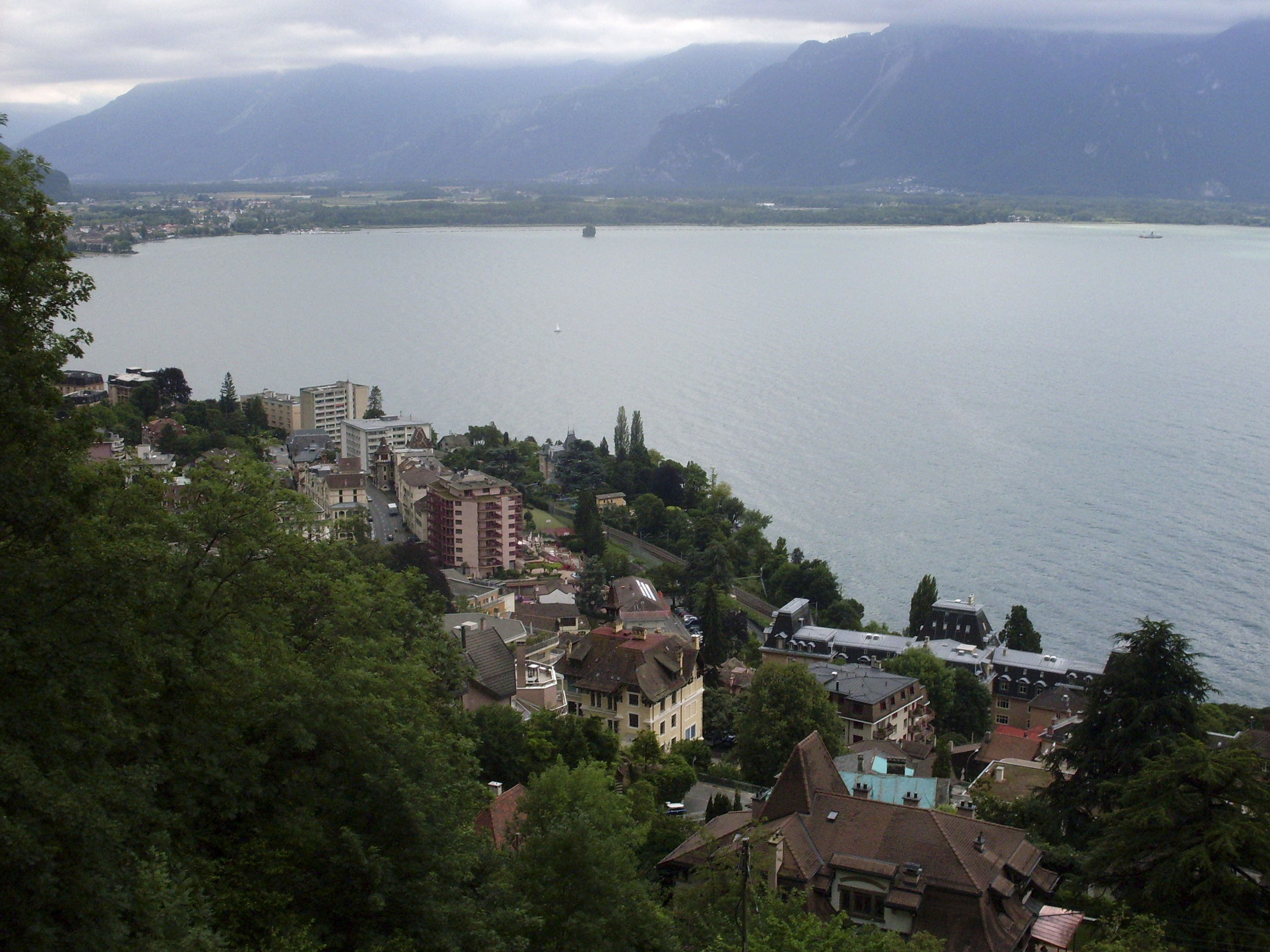 Territet, Kanton Waadt und der Genfer See von Glion aus